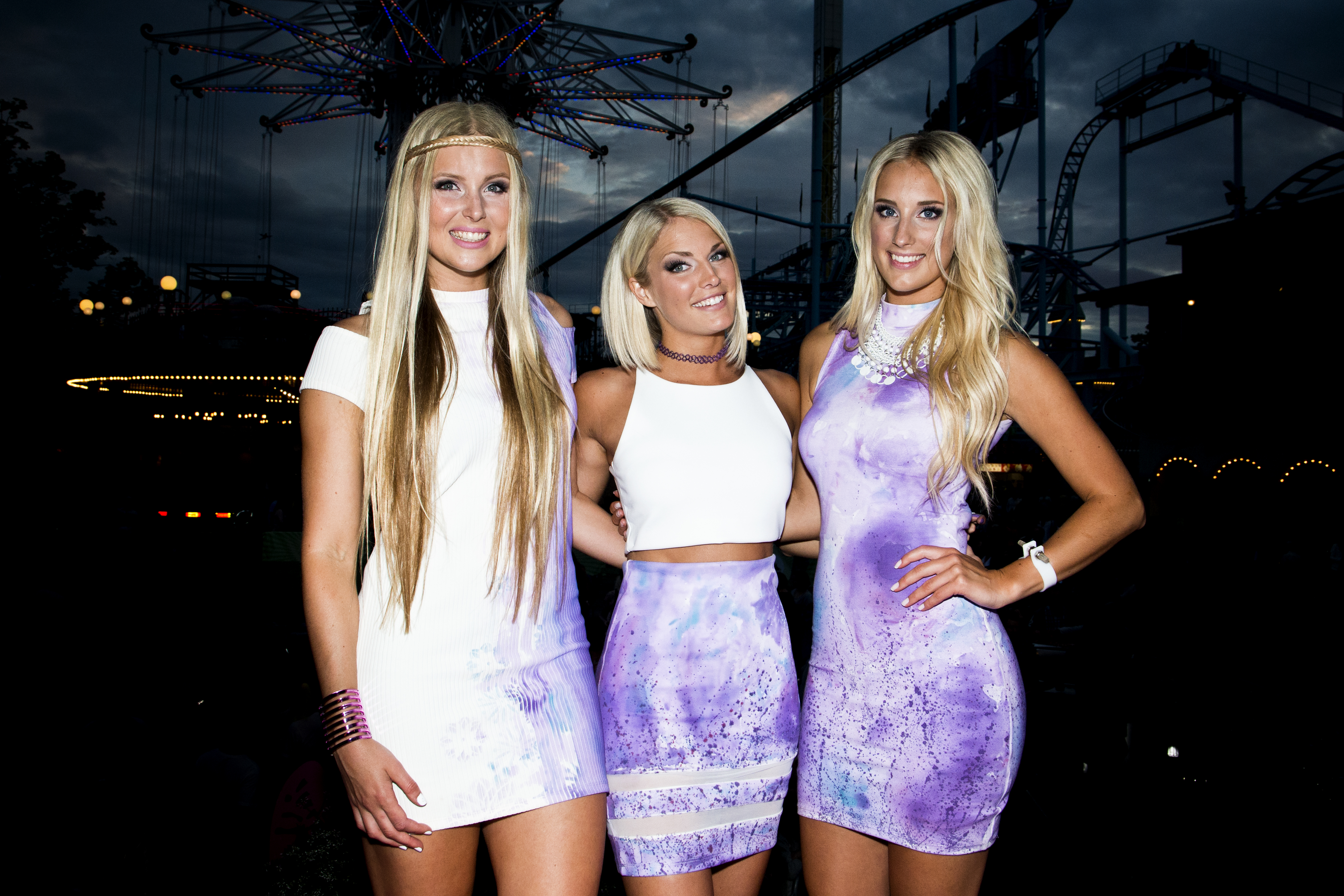 Timoteij på Sommarkrysset 2015.